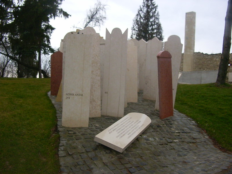 Nemzeti Emlékhely, Balf, Temető-domb.